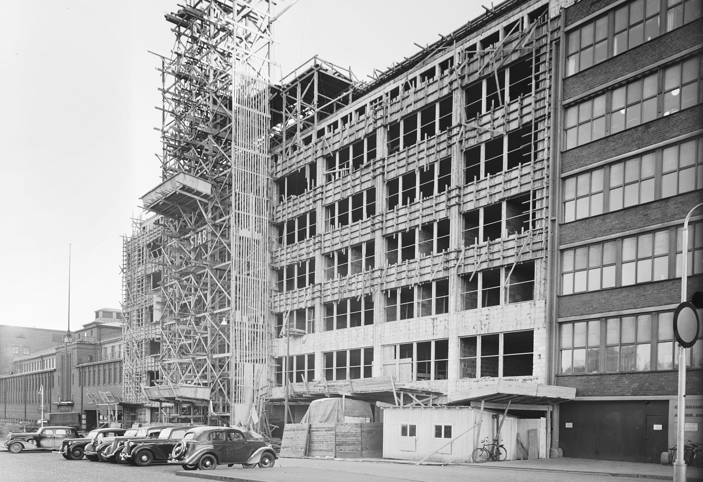 Bröderna Hedlunds kontors- och industrihus, Norra stationsgatan 79-81 Under uppbyggnad